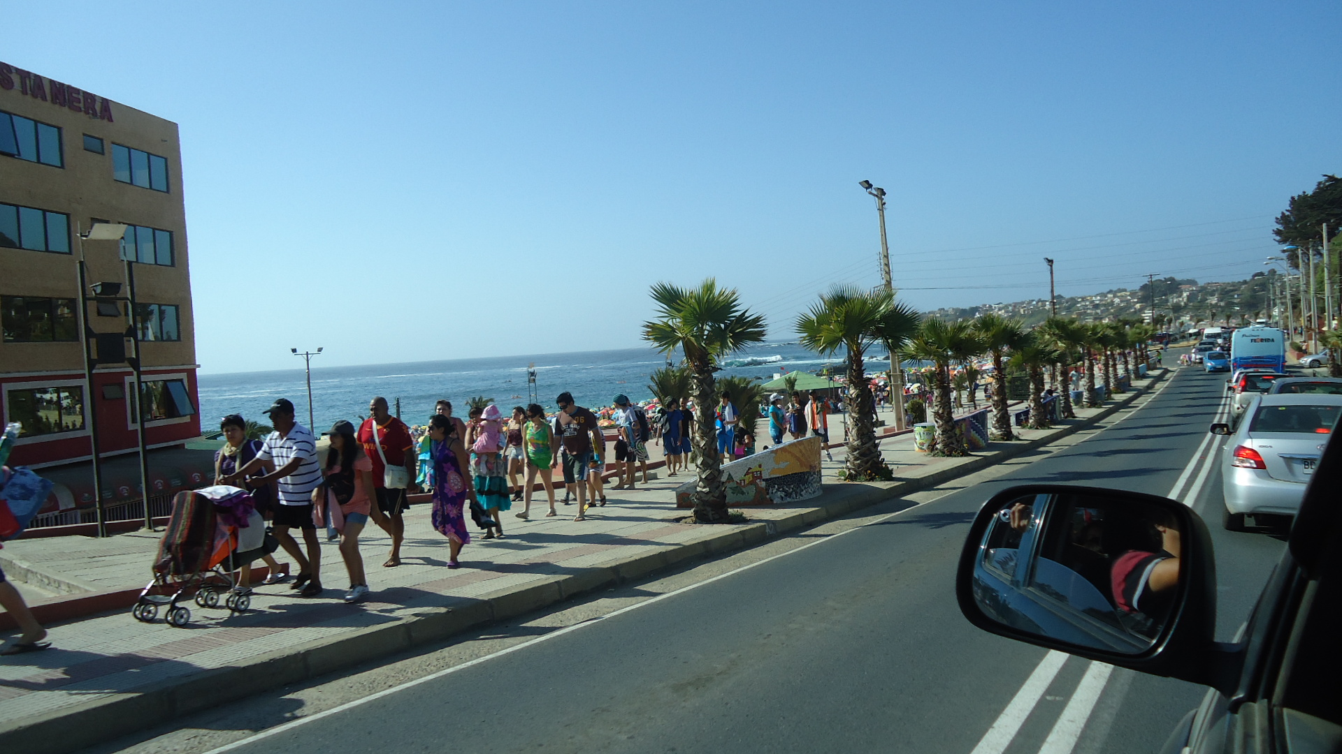 Bahía de El Quisco desde la Avenida Isidoro Dubornais.